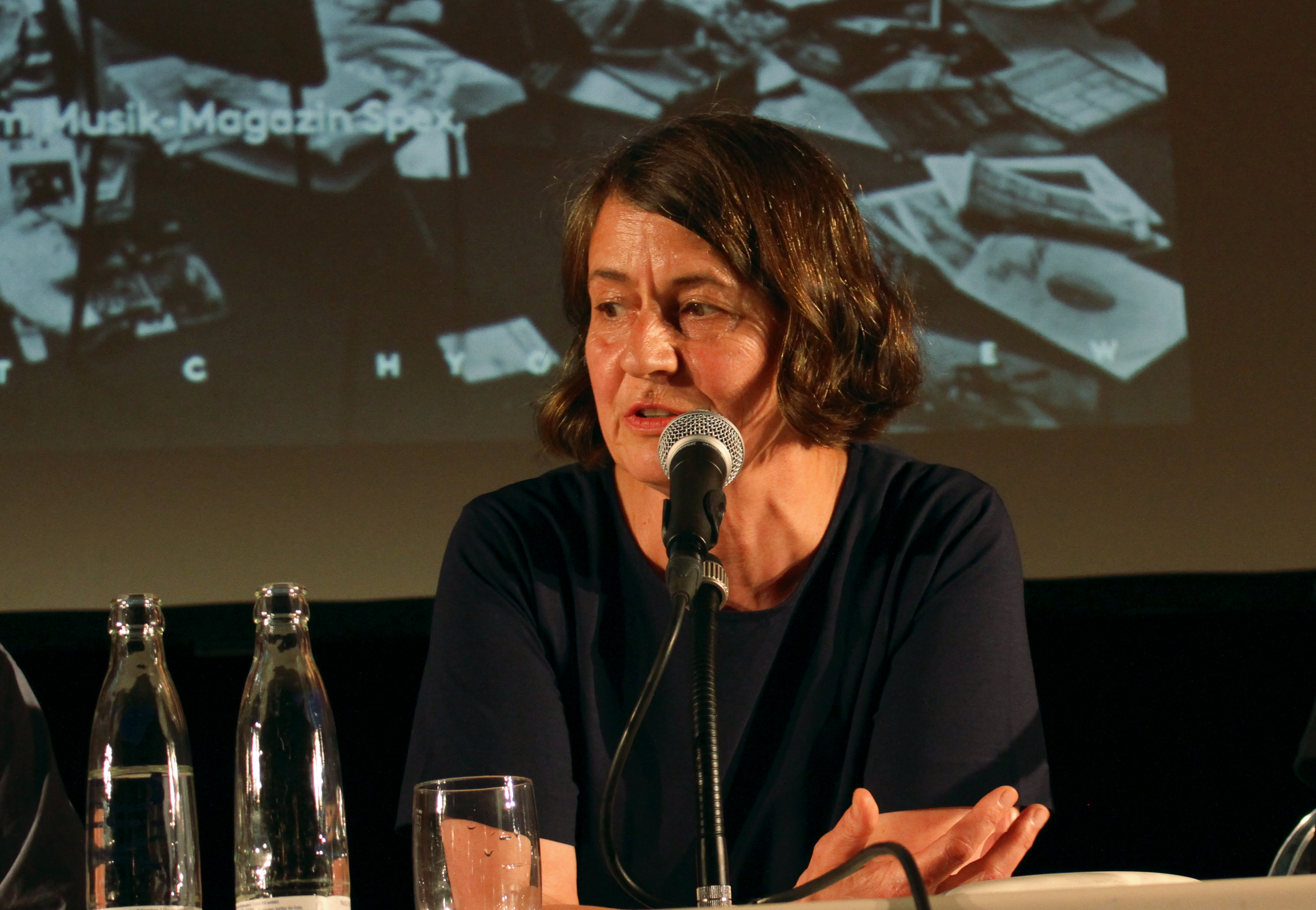 Michaela Melián im Haus der Kunst, München